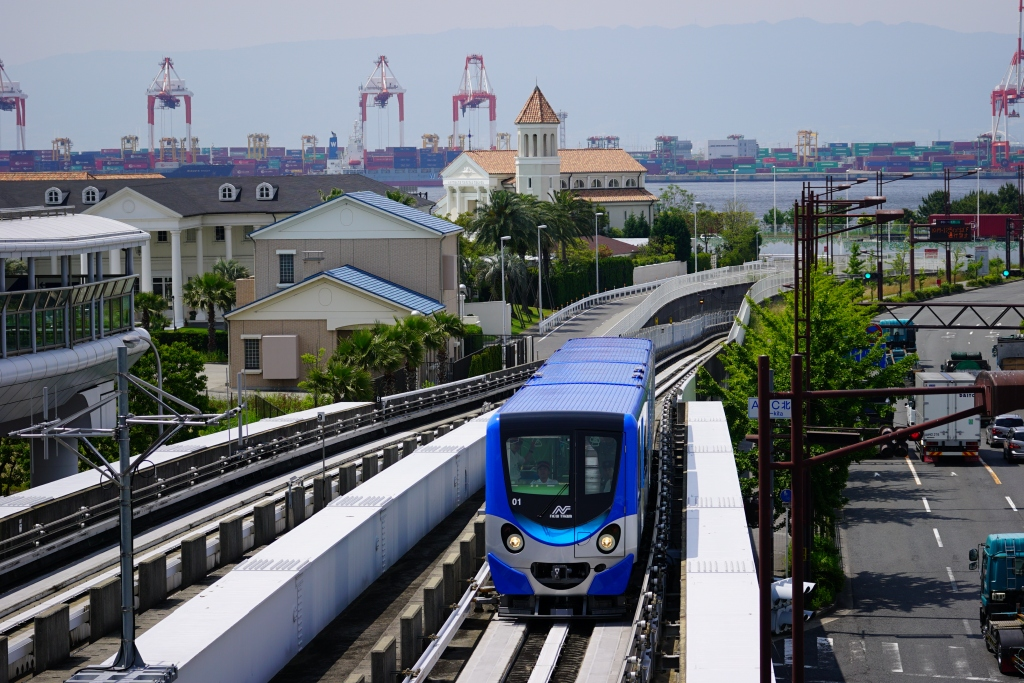 ニュートラム200系車両です